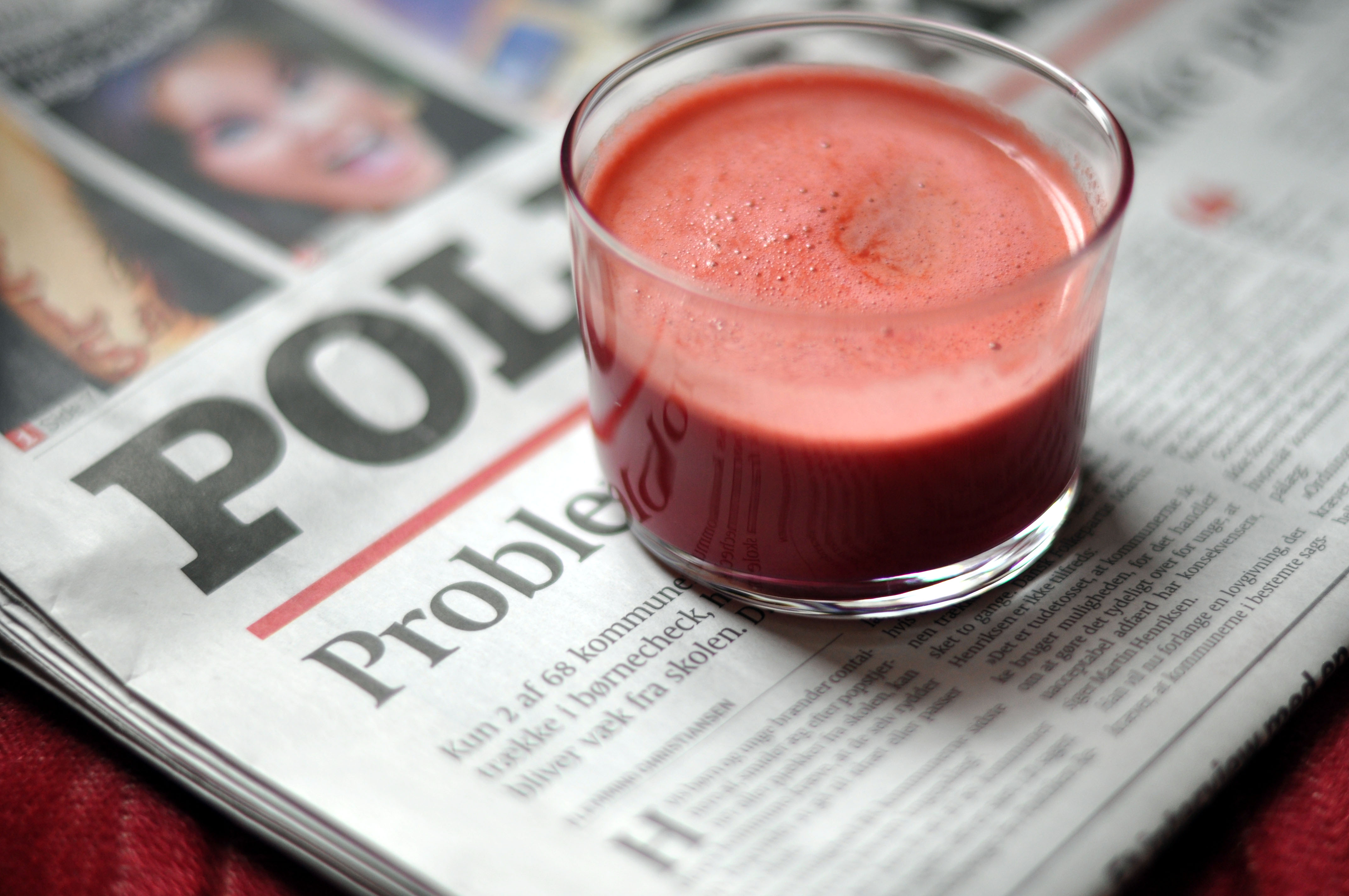 Juice af æbler, rødbede, gulerødder, grape og ingefær (Juice of apples, beetroot, carrots, grapefruit and ginger)